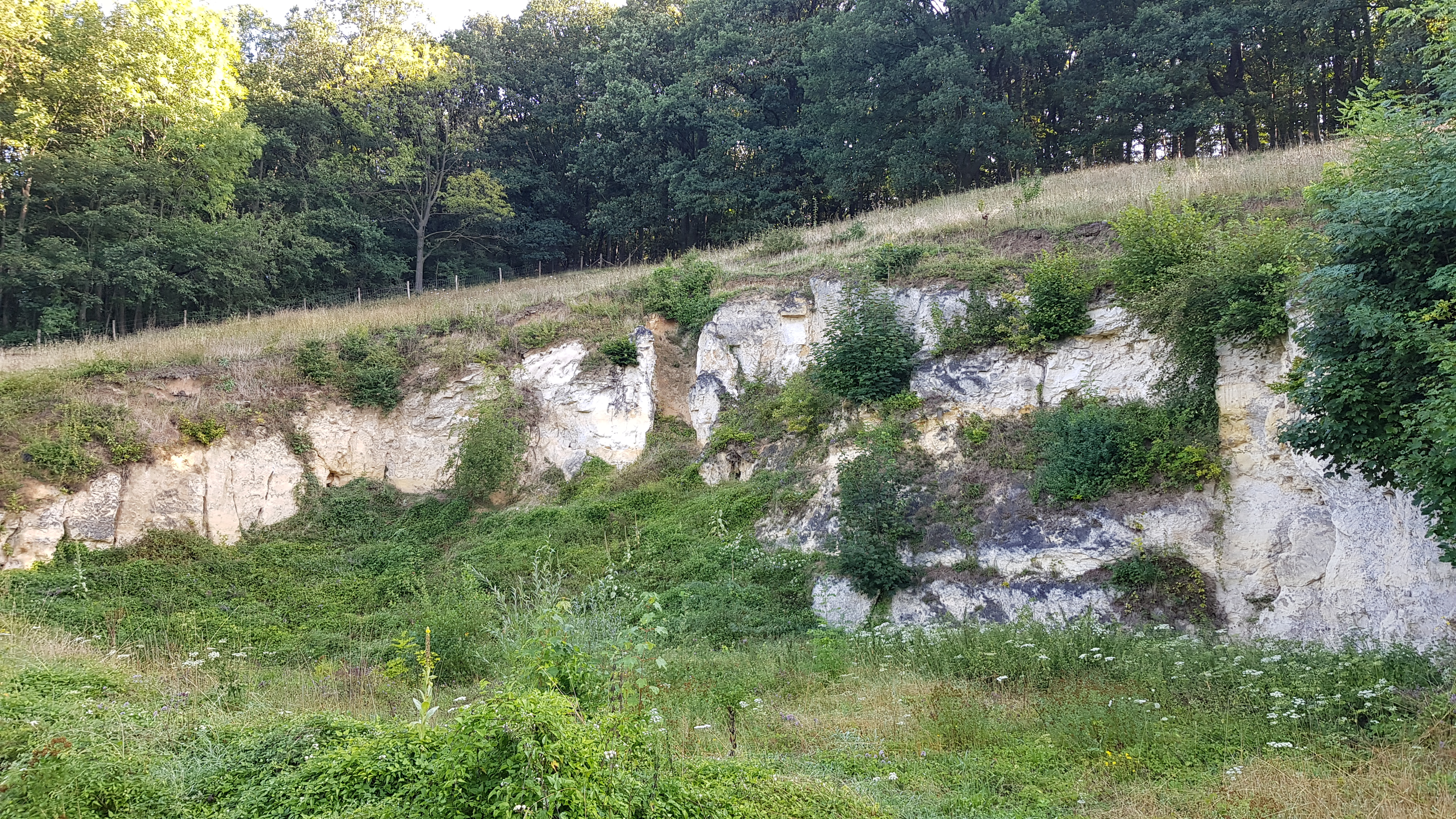 Koeberggroeve, Cadier en Keer, Nederland